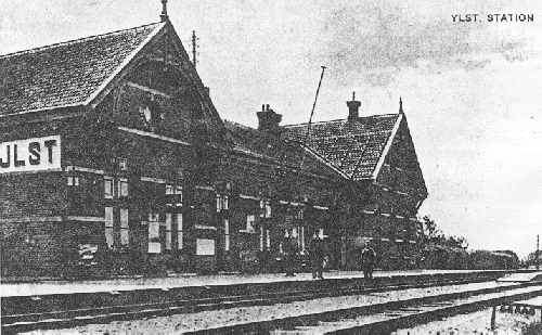 PD door ouderdom